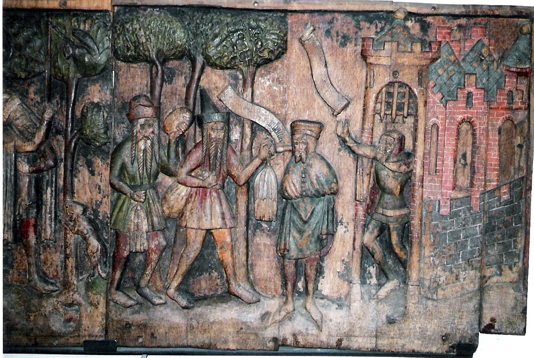 Tafel D des Russland- bzw. Rigafahrergestühls in der Nikolaikirche in Stralsund, entstanden im 14. Jhd. zwischen 1360 und 1370. Handel zwischen Russen und den Stralsunder Händlern, zwei Russen (links) bieten Felle und Wachs an, Ort des Handels ist Nowgorod oder Riga.